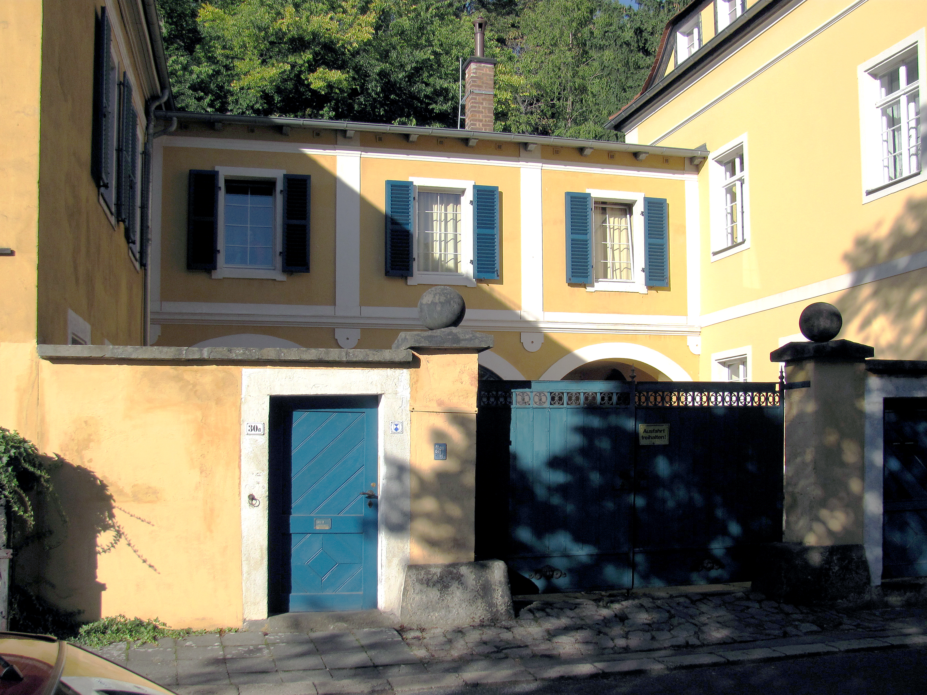 Radebeul, Minckwitzscher Weinberg, Obere Bergstraße 30a